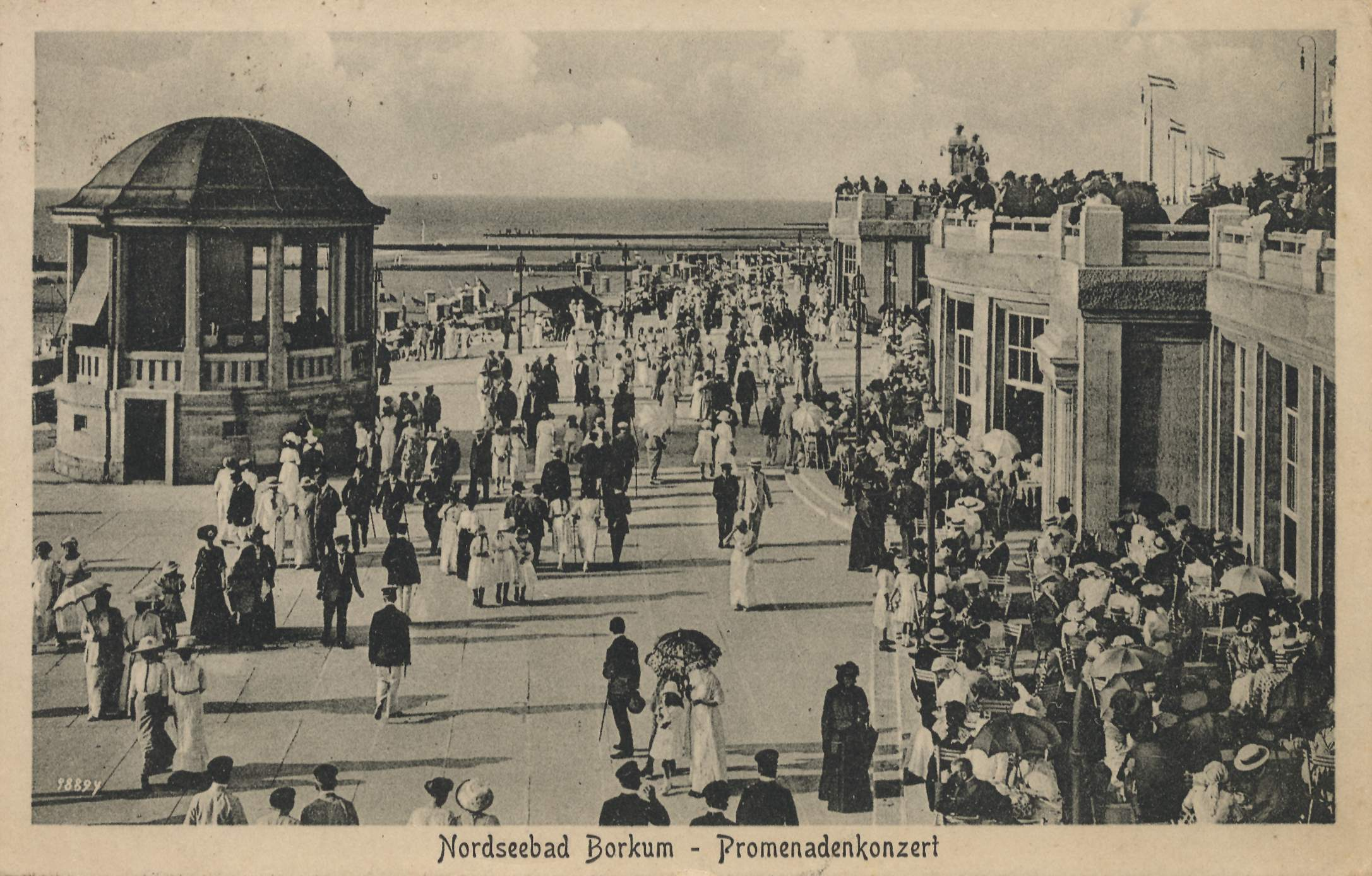 Nordseebad Borkum. Promenadenkonzert.